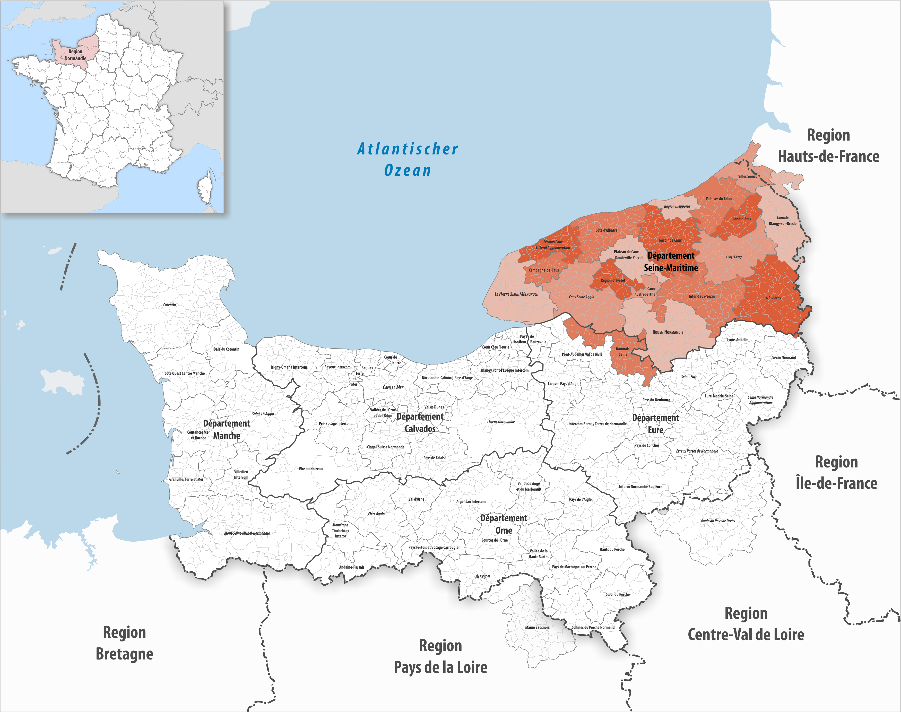 Gemeindeverbände im Département Seine-Maritime